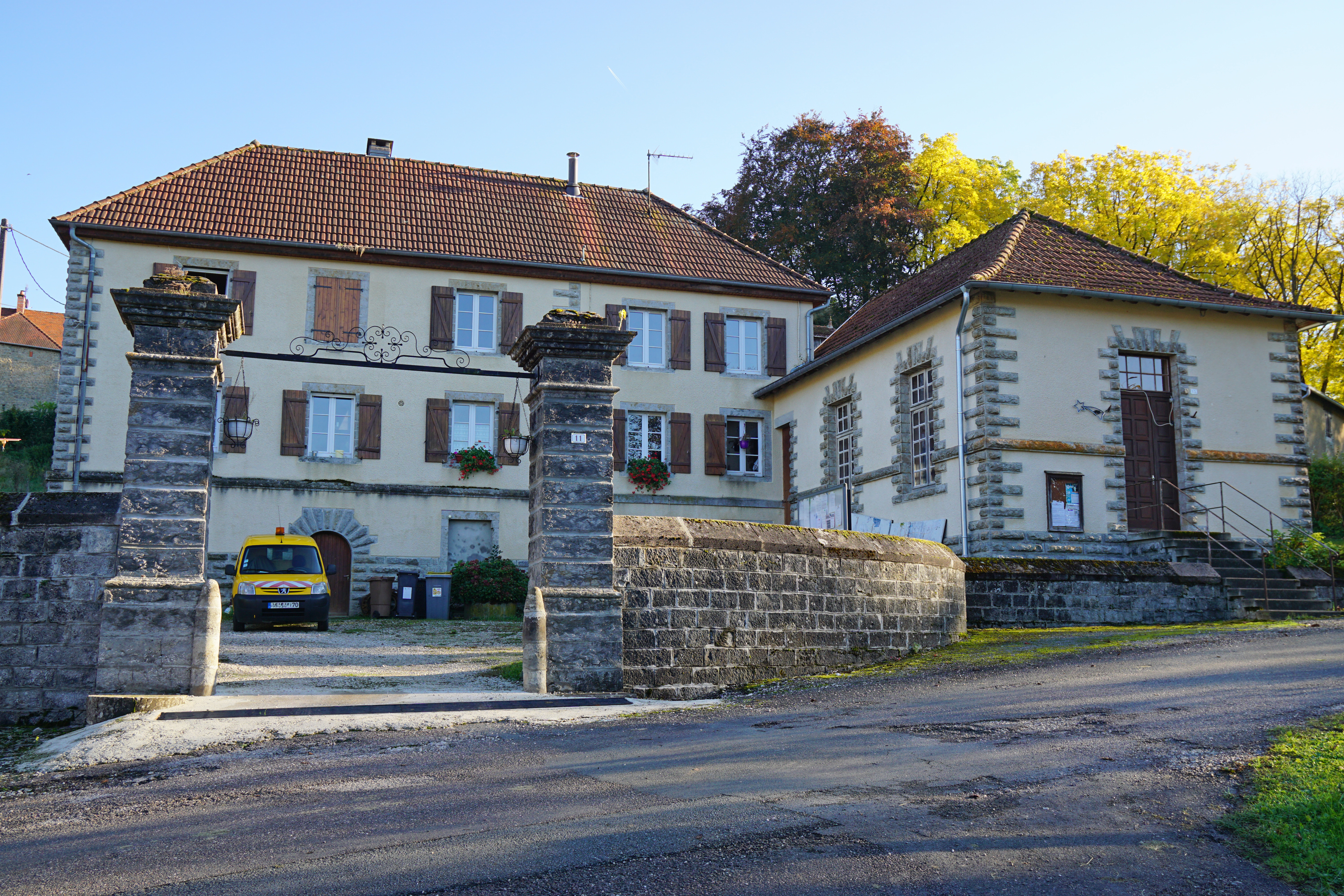 La mairie de Cubry.